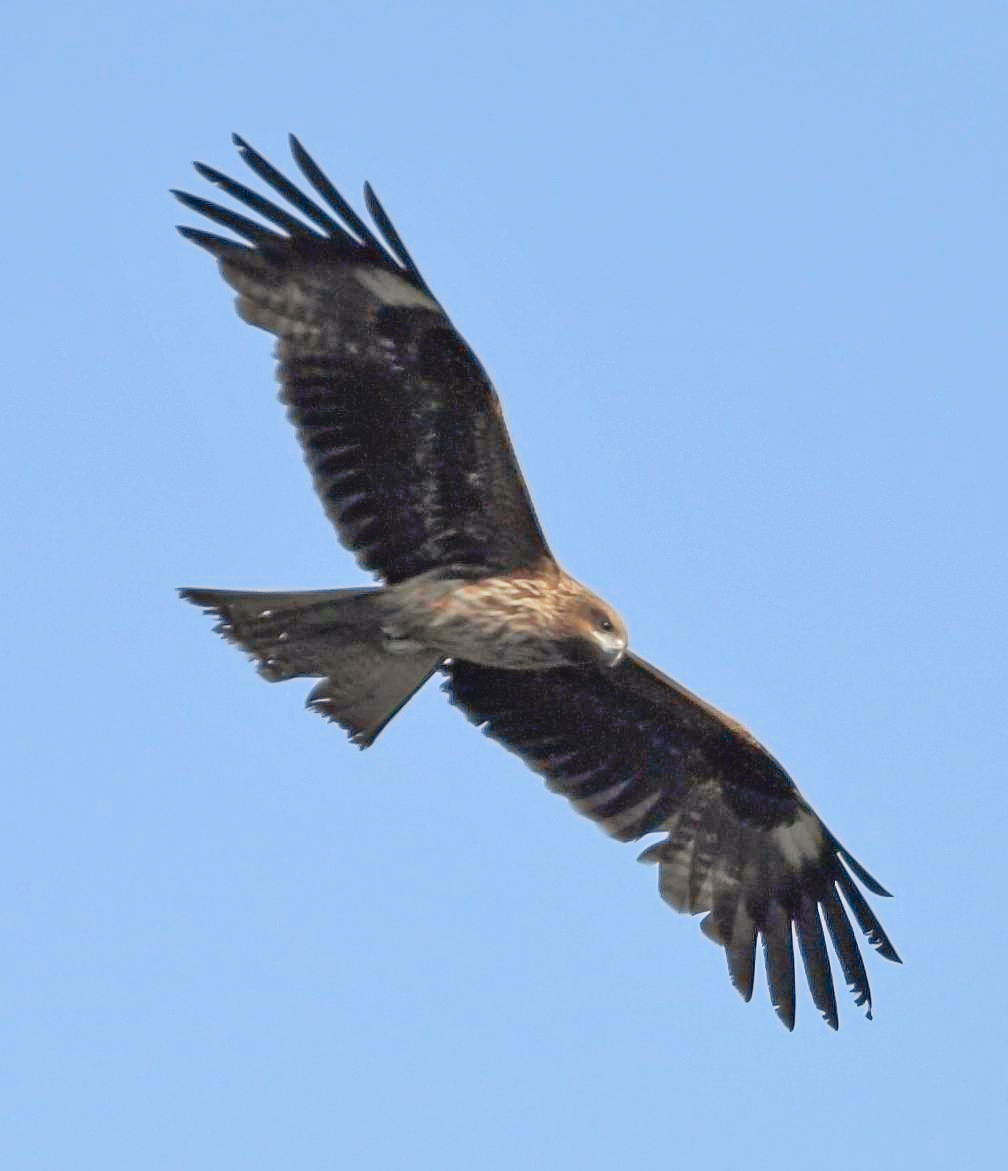 トビ（鳶） / Black Kite / Milvus migrans